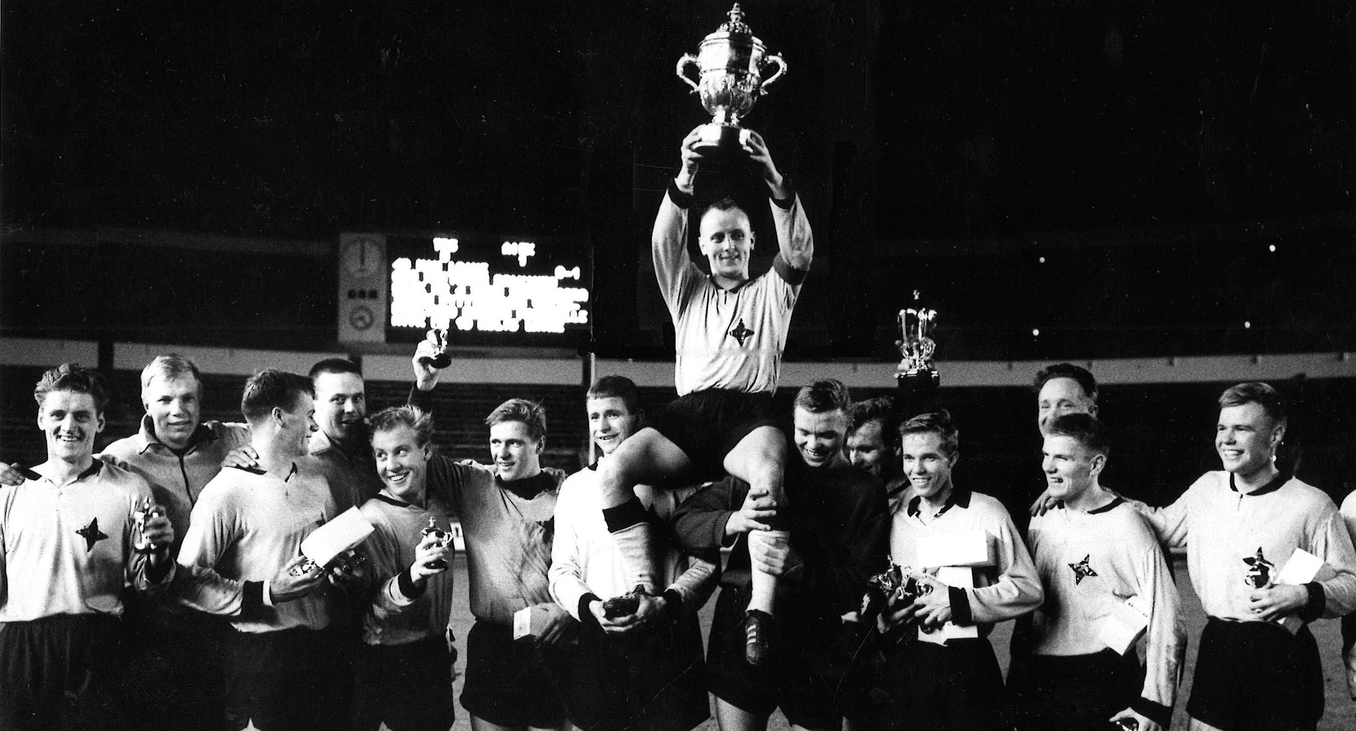 Suomen Cupin voittajajoukkue Åbo IFK vuonna 1965: vasemmalta Reijo Kanerva, Esko Strandberg, Simo Syrjävaara, Vilho Raatikainen, Caj Stjärnstedt, Hans Martin, Timo Niemi, Aulis Laine (kannettuna), Teemu Koskikuusi, Thor Björn Lundqvist, Pekka Laakso, Reino Koskinen (takana), Erik Lönnfors, Bengt Boman ja Sakari Ruuttu. Paikka Helsingin Olympiastadion.